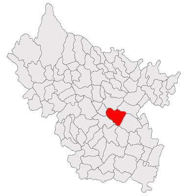 Categorie:Hărţi ale judeţului Buzău